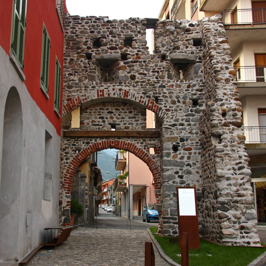 i resti della medioevale Porta Romana a Omegna (VB)